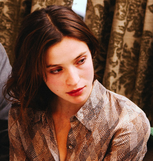 Daniela Ramírez, actriz chilena.